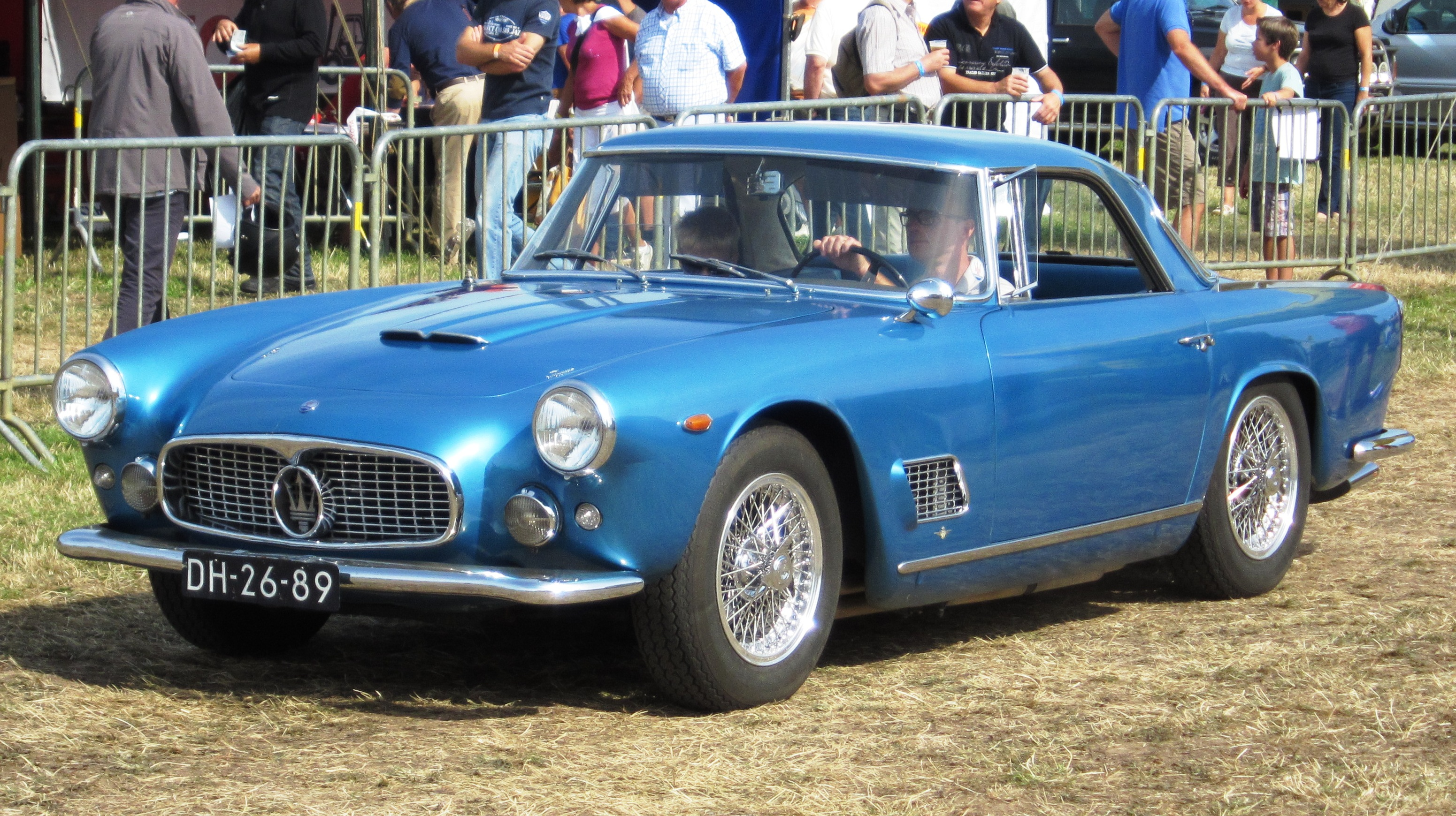 Maserati 3500 GT en azure